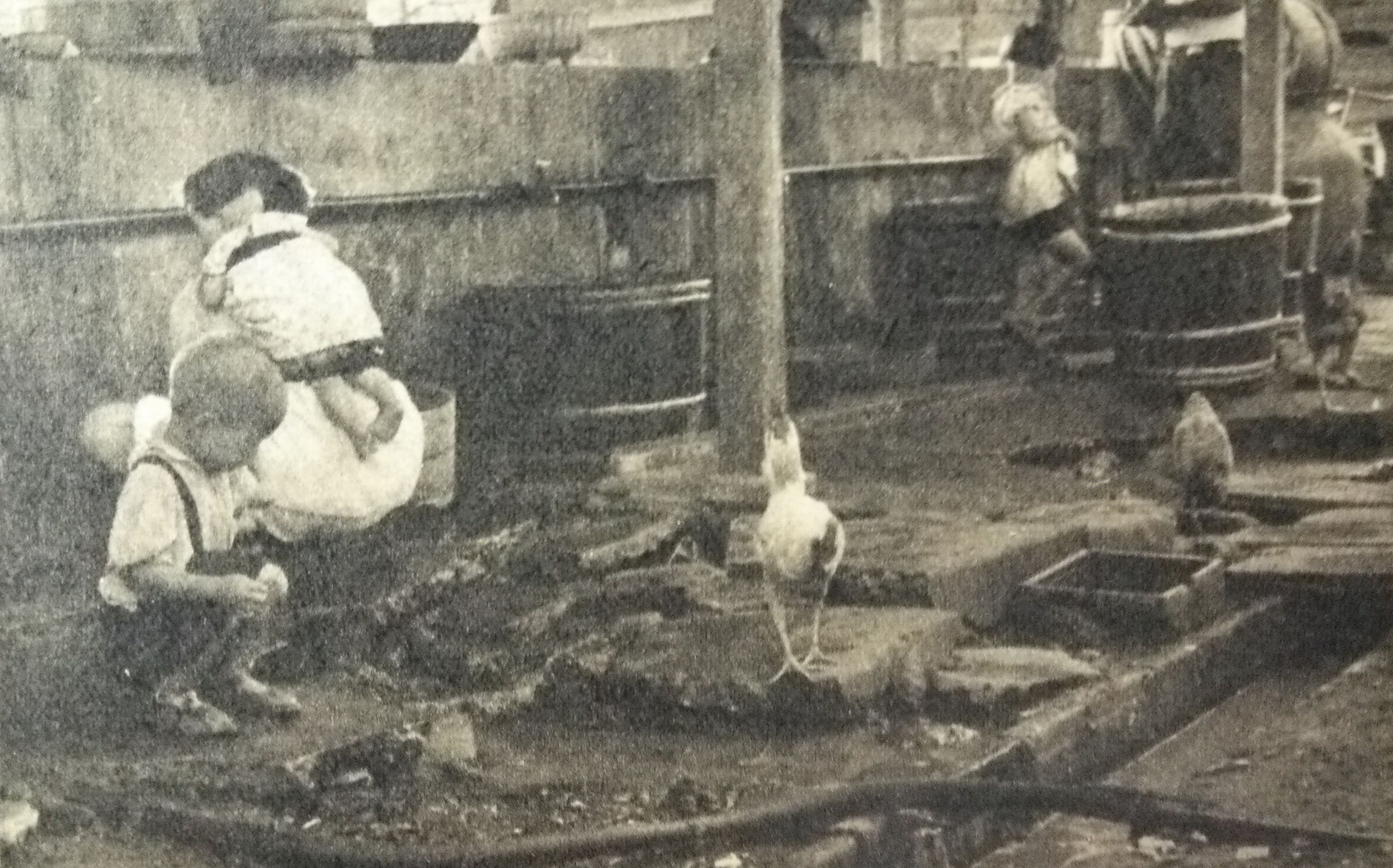 枝川のコリアタウン